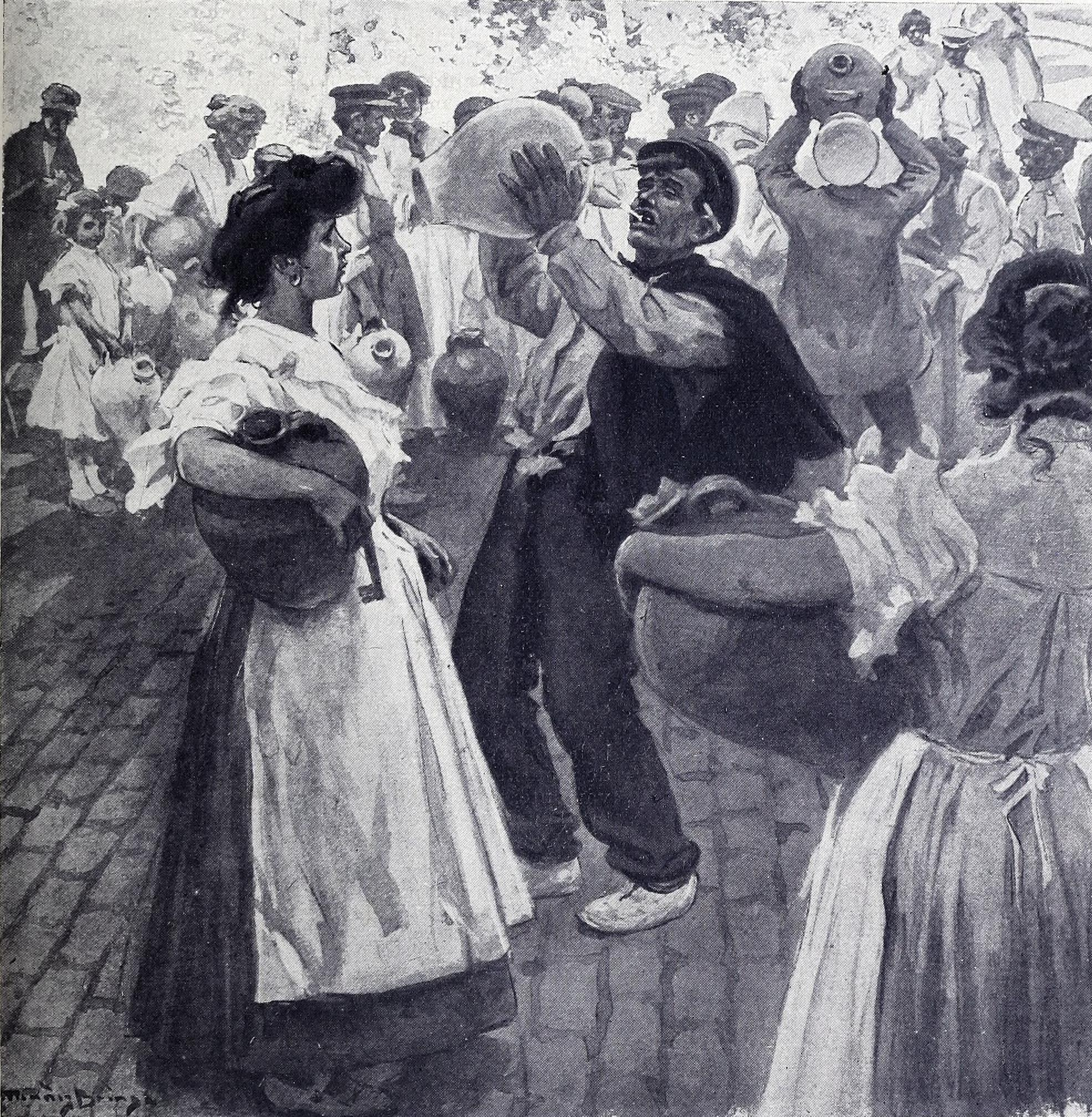 La sed estival, o cómo se bebe en Madrid.